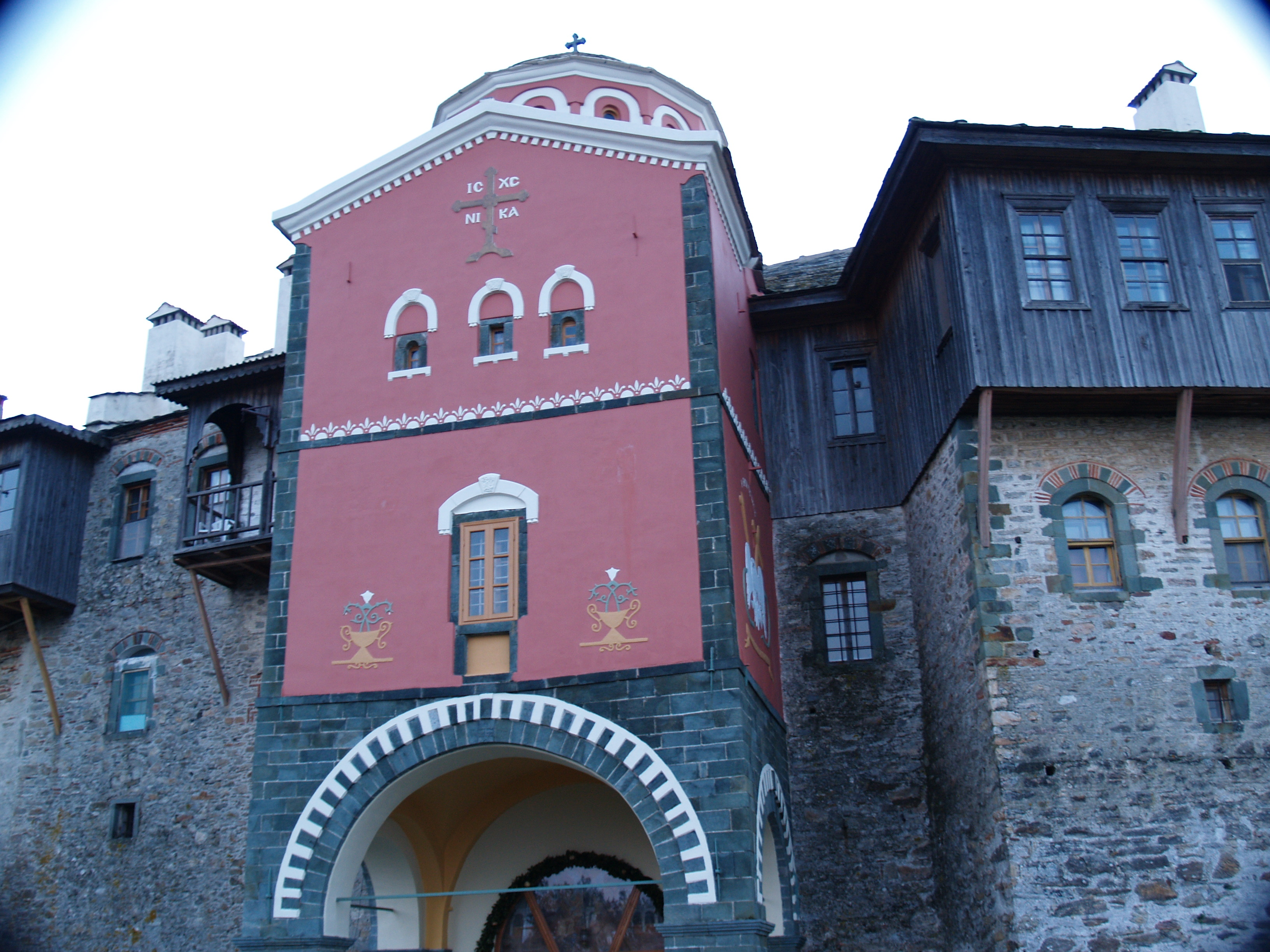 «Μονή Φιλοθέου»